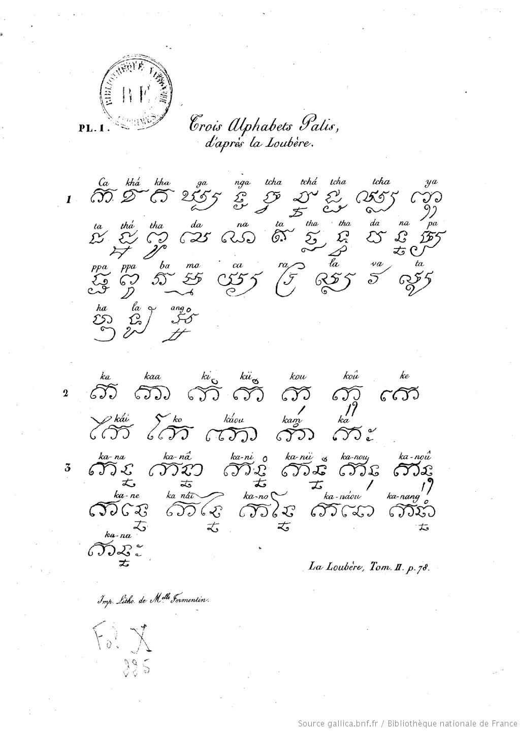 L’Alphabet Pali, collection des planches, planche 1, page 4.